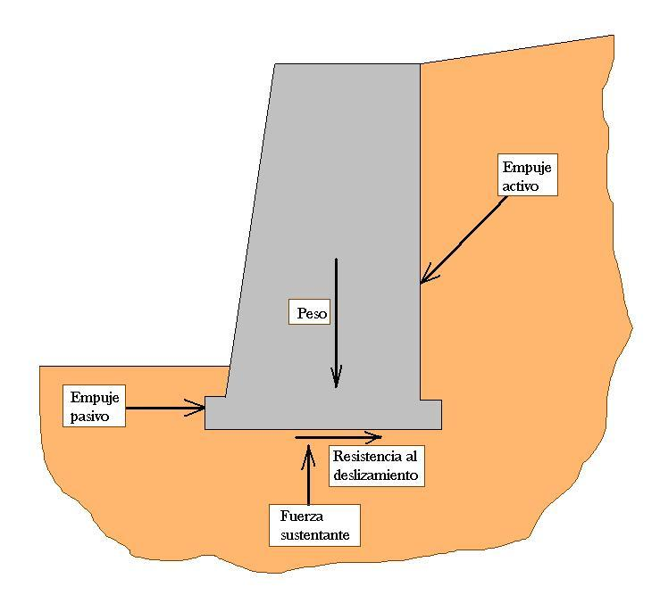 Croquis de las principales fuerzas actuando sobre un muro de contención